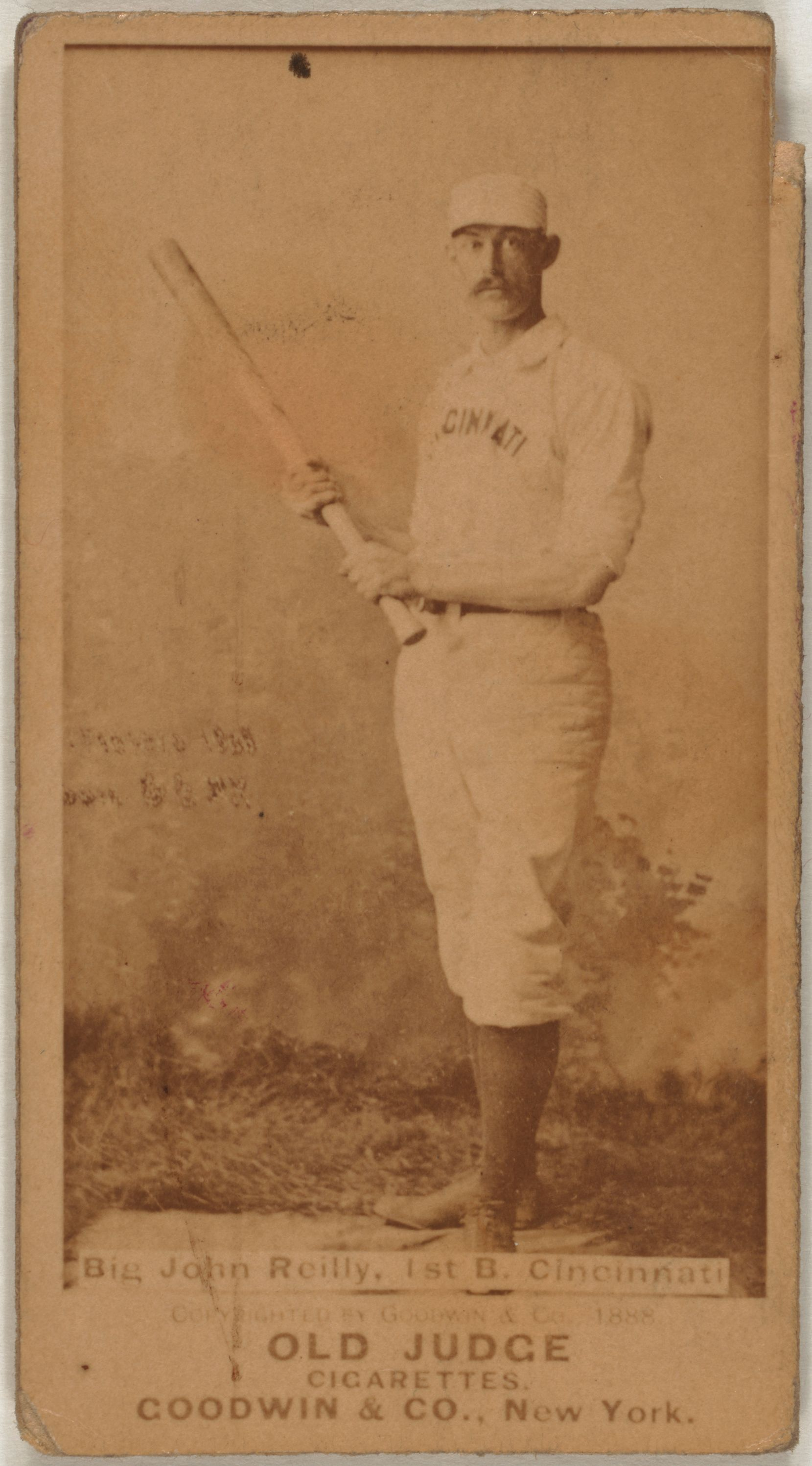 Big John Reilly